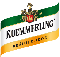 Kümmerling label